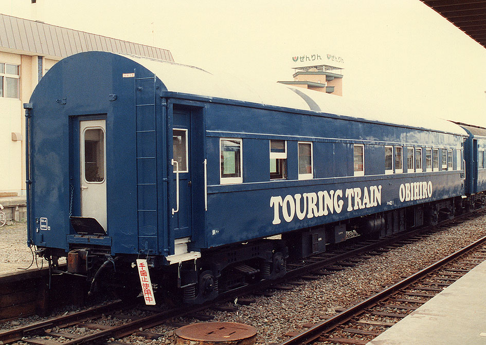 国鉄 スヤ42 1 ツーリングトレイン 帯広